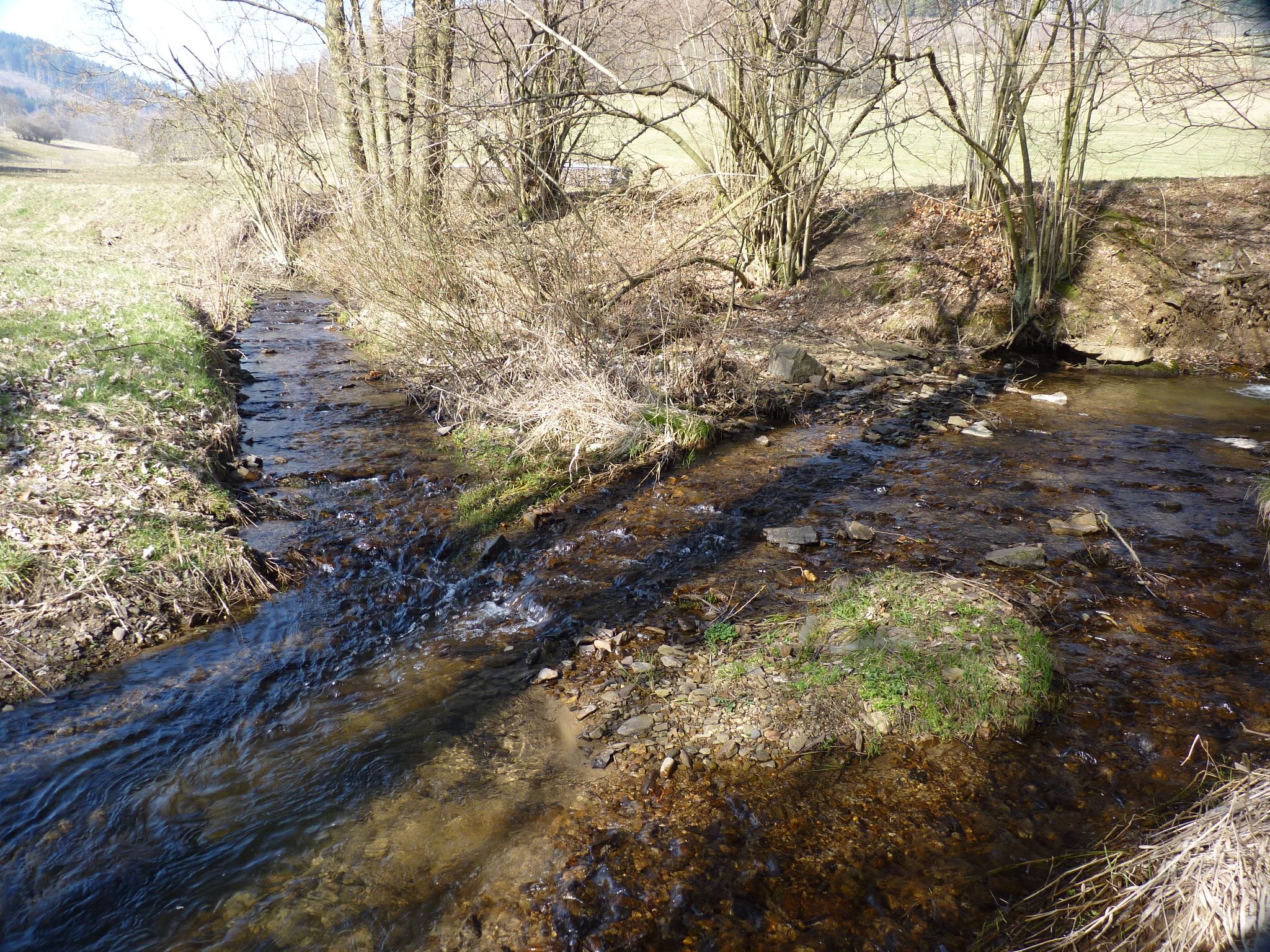 Mündung des Kütschenlangenbachs in die Sieg bei Flusskilometer 2 (ab Quelle)